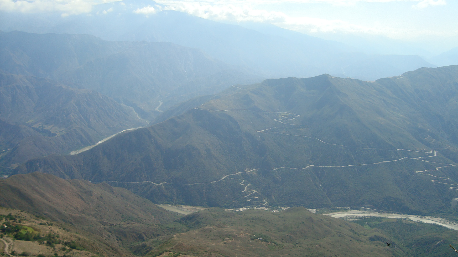 Cañón del chicamocha ubicado en el departamento de santander a 40 minutos de la ciudad de Bucaramanga, Colombia.